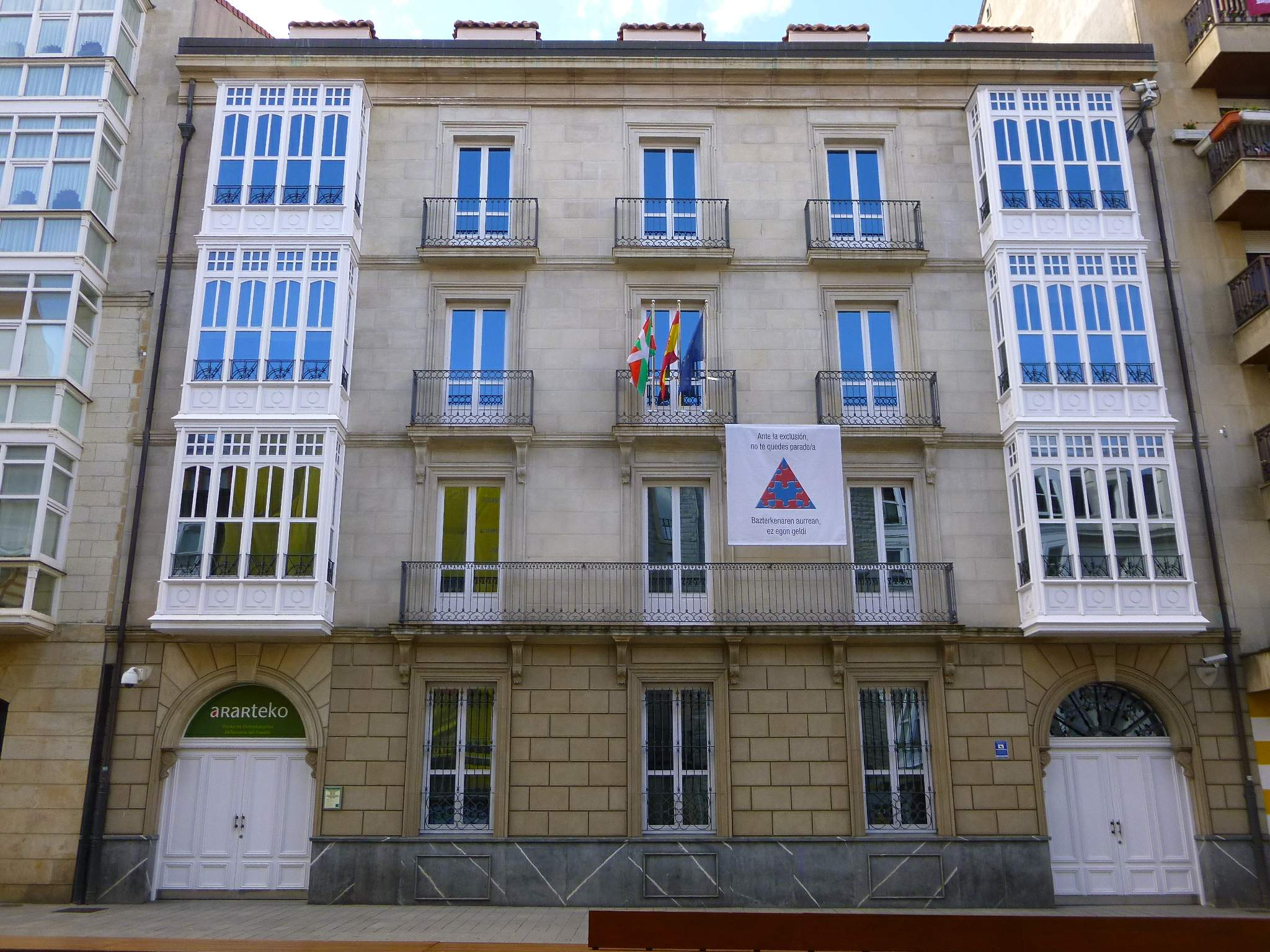 Vitoria - Calle Prado, sere del Ararteko (Defensor del Pueblo Vasco)